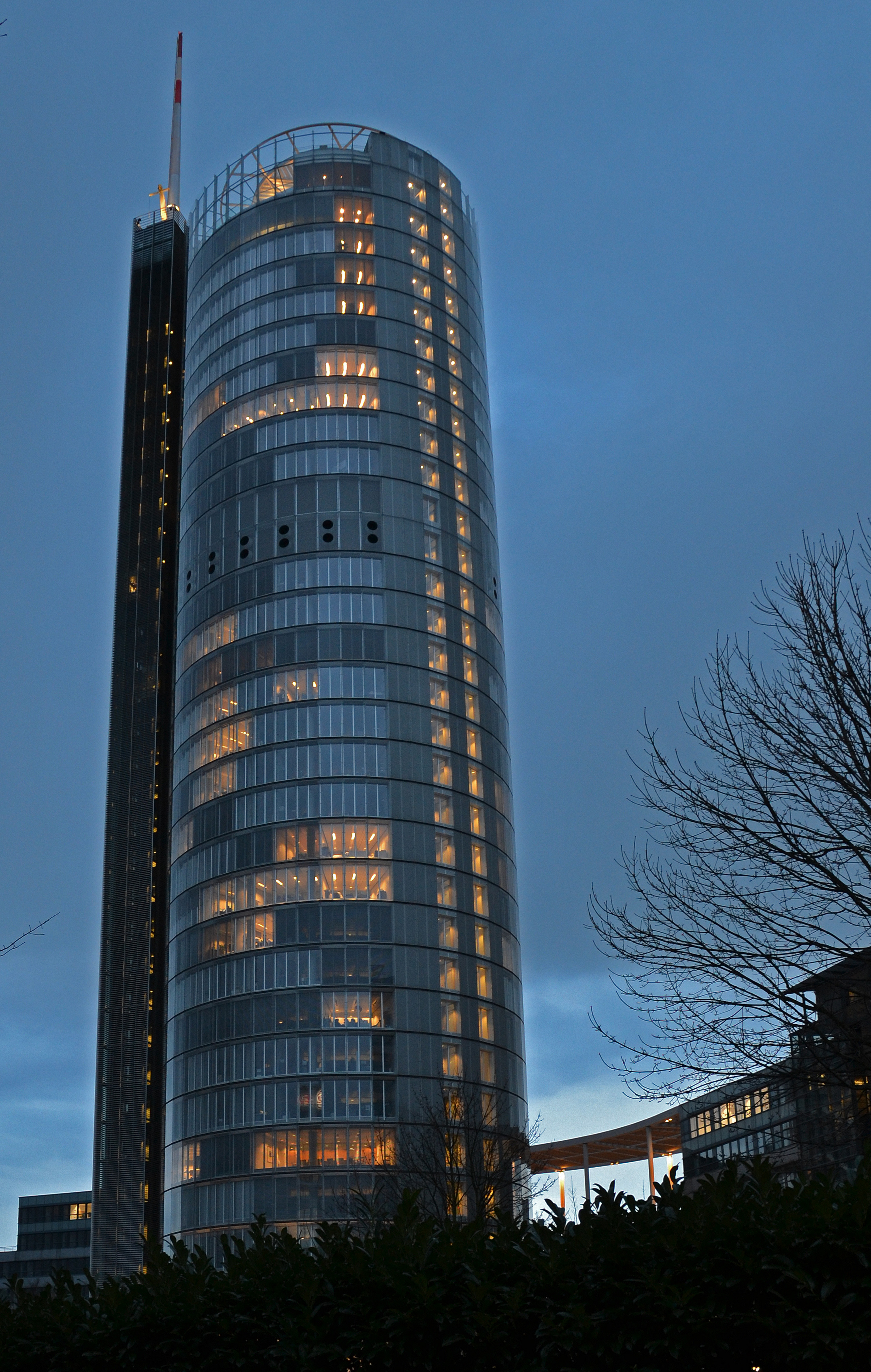 RWE-Turm im Südviertel der Stadt Essen